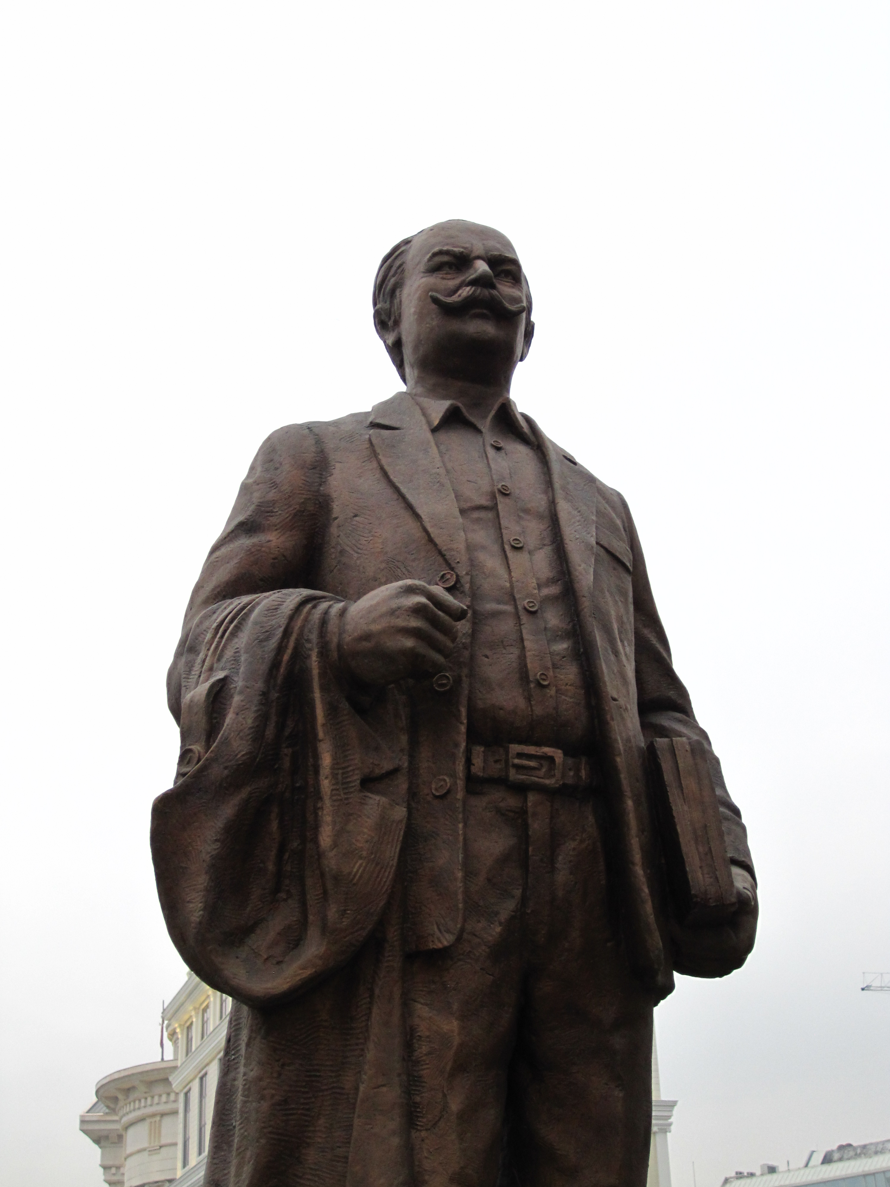 Споменик - Ванчо Николески во Скопје.